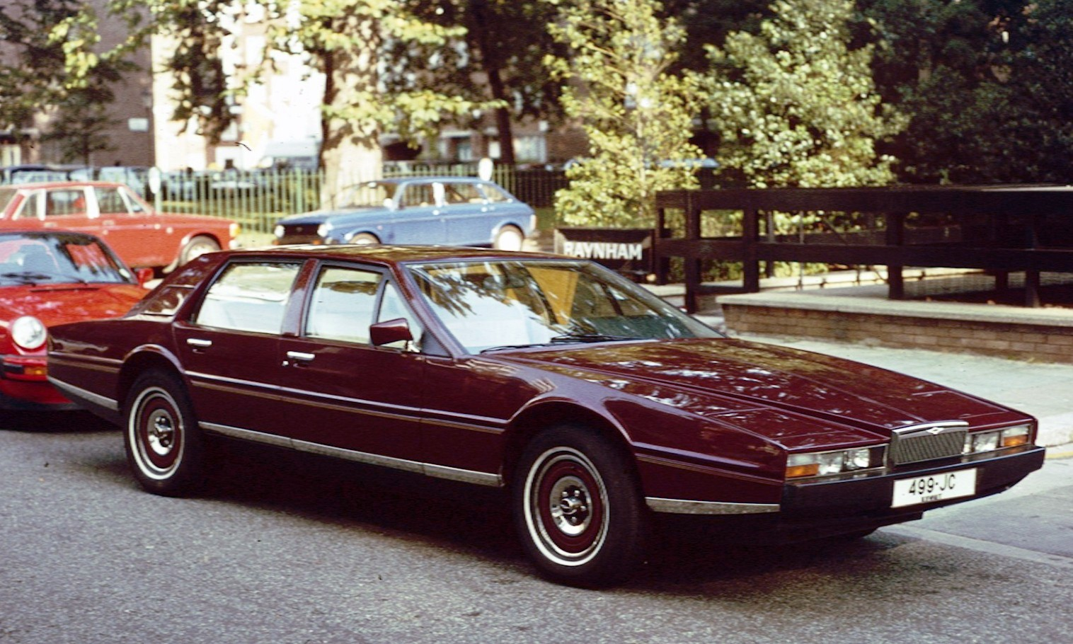 Aston Martin Lagonda in Cambridge Square, Hyde Park Estate, London W2 2PQ, England